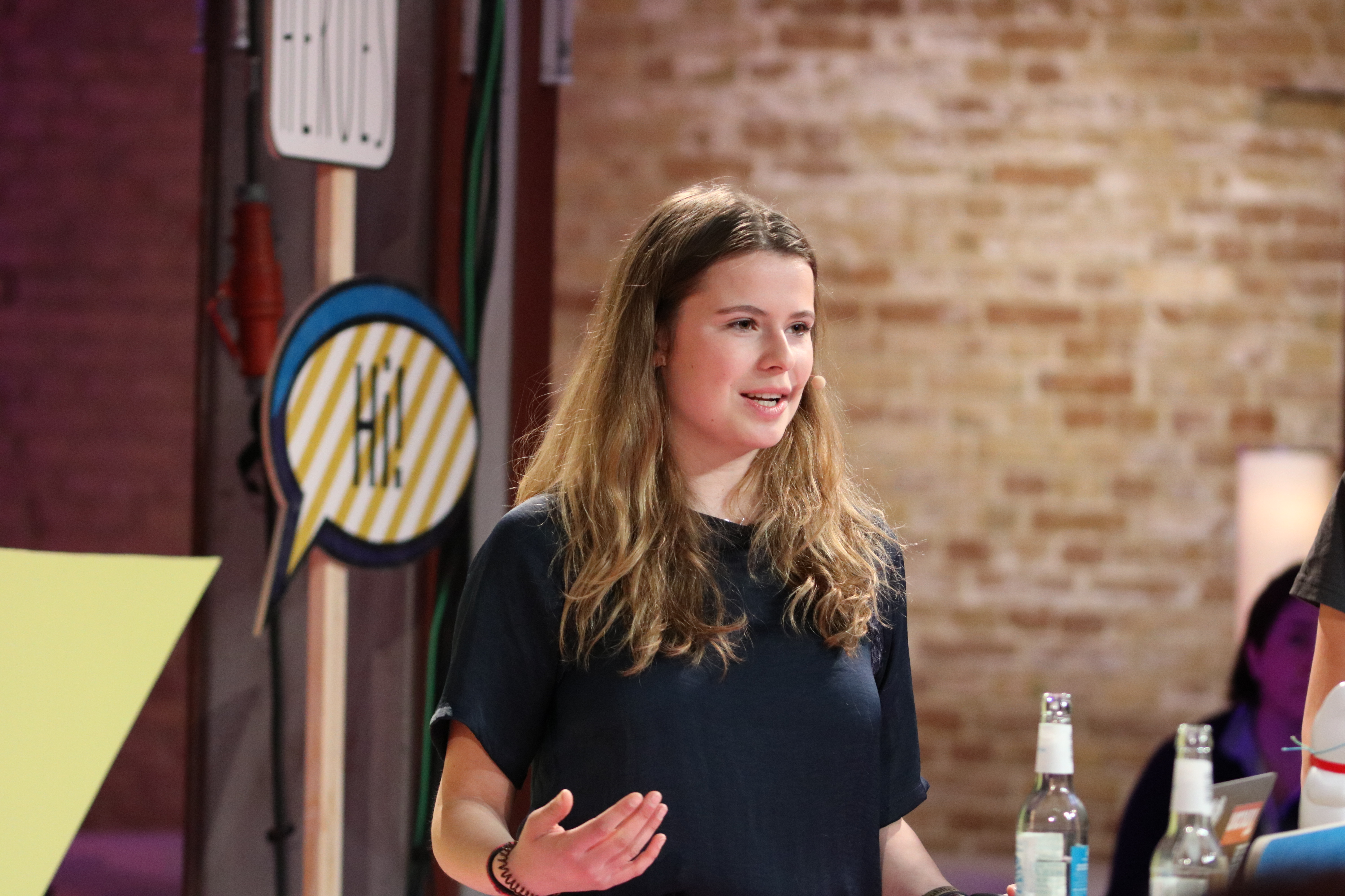 Luisa-Marie Neubauer (* 21. April 1996 in Hamburg), eine deutsche Klimaschutz-Aktivistin bei einem Vortrag auf der TINCON @ republica 2019 (Anfang Mai 2019).